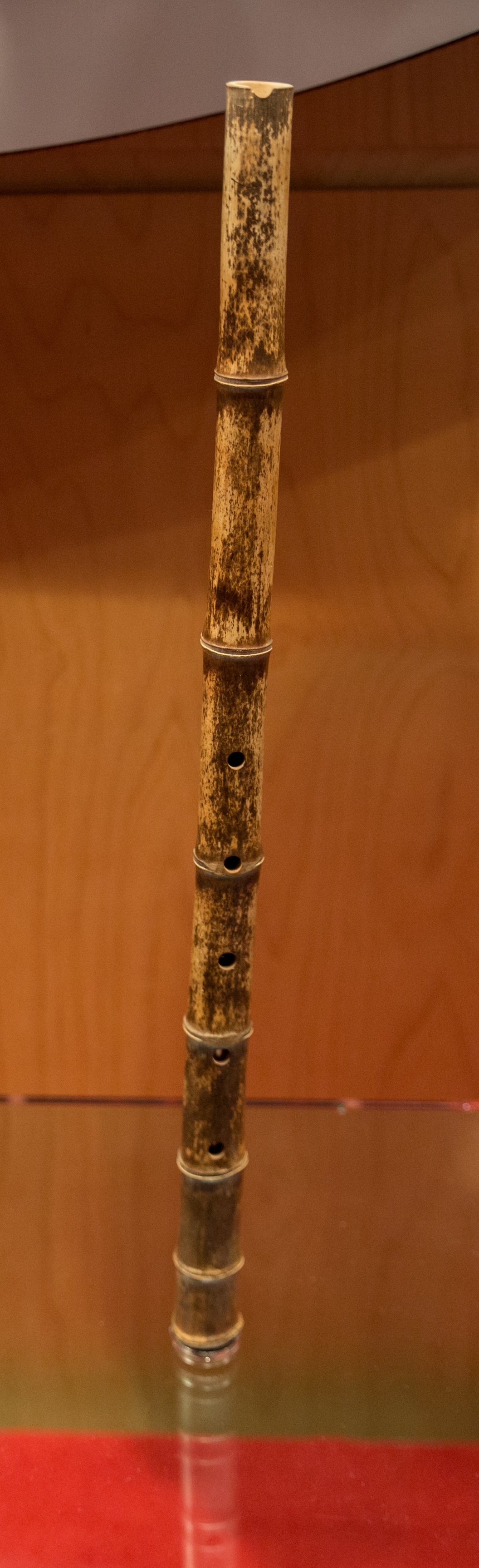 Yak, exposat a Eolssigu! Els sons de Corea